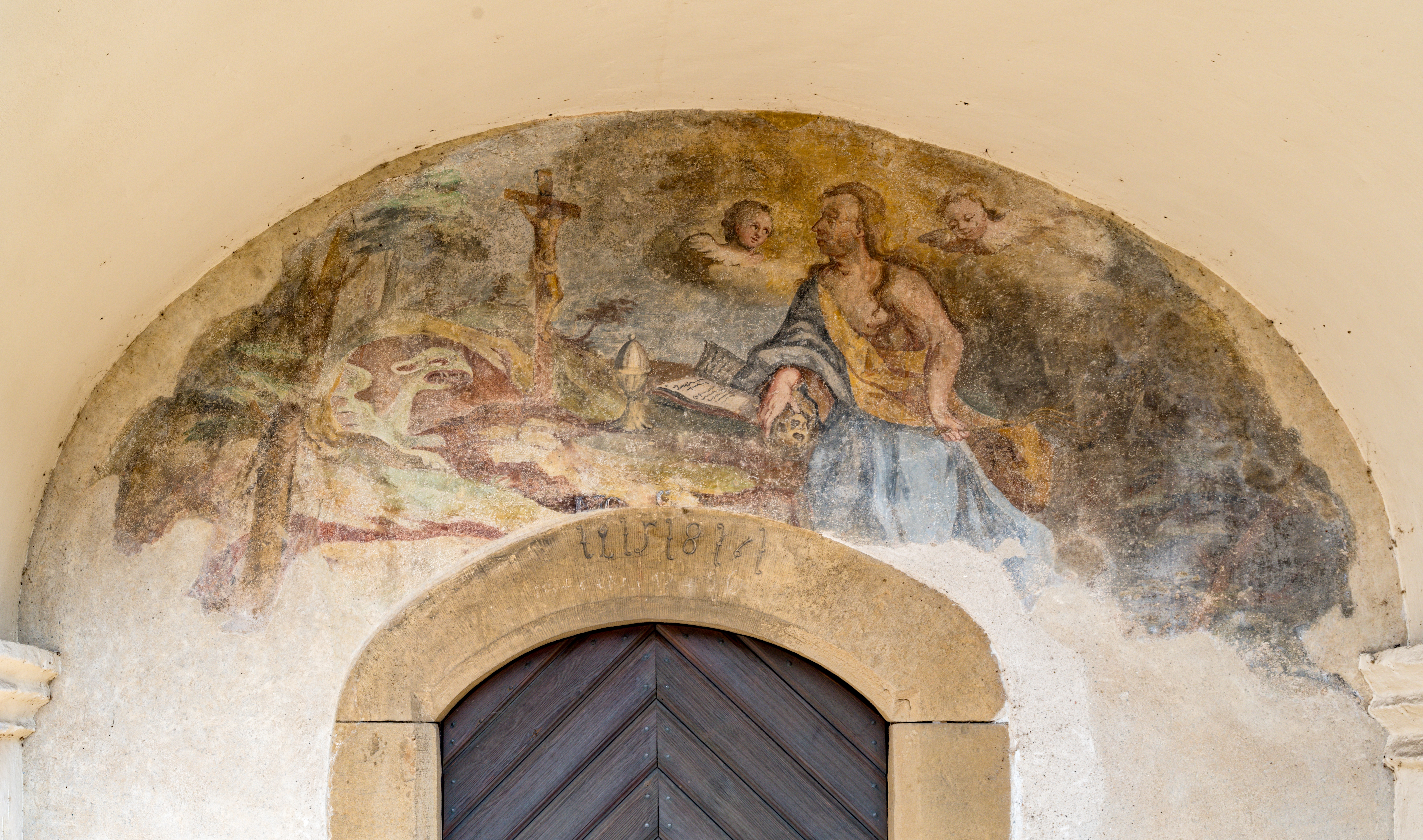 Bilder aus Staufen im Breisgau, die St. Magdalenenkapelle